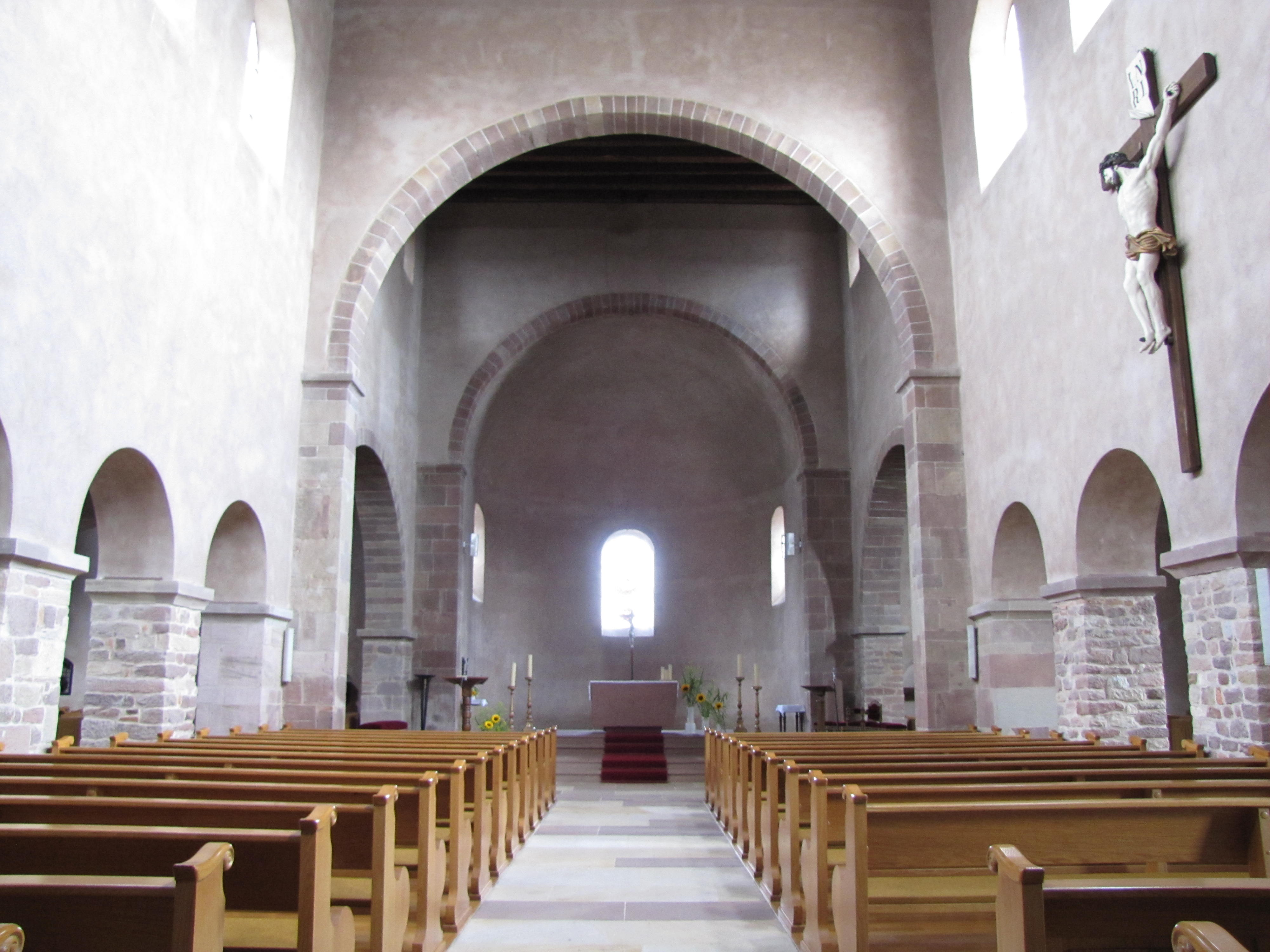 Alsace, Bas-Rhin, Église Saint-Trophime d'Eschau (PA00084707, IA00023089).Vue intérieure de la nef vers le chœur. La croisée du transept est encadrée par trois gros arcs-diaphragmes.